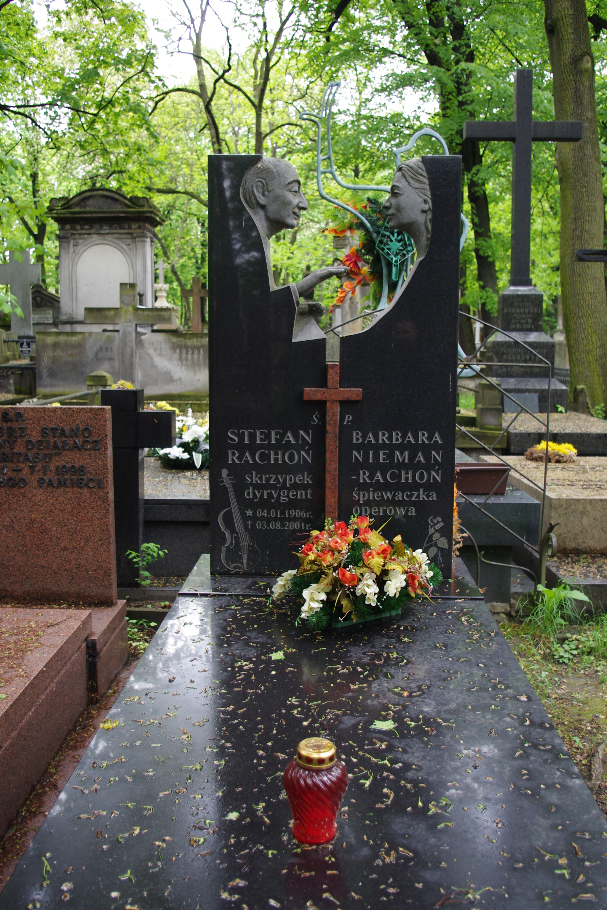 Grób dyrygenta Stefana Rachońa na Starych Powązkach w Warszawie